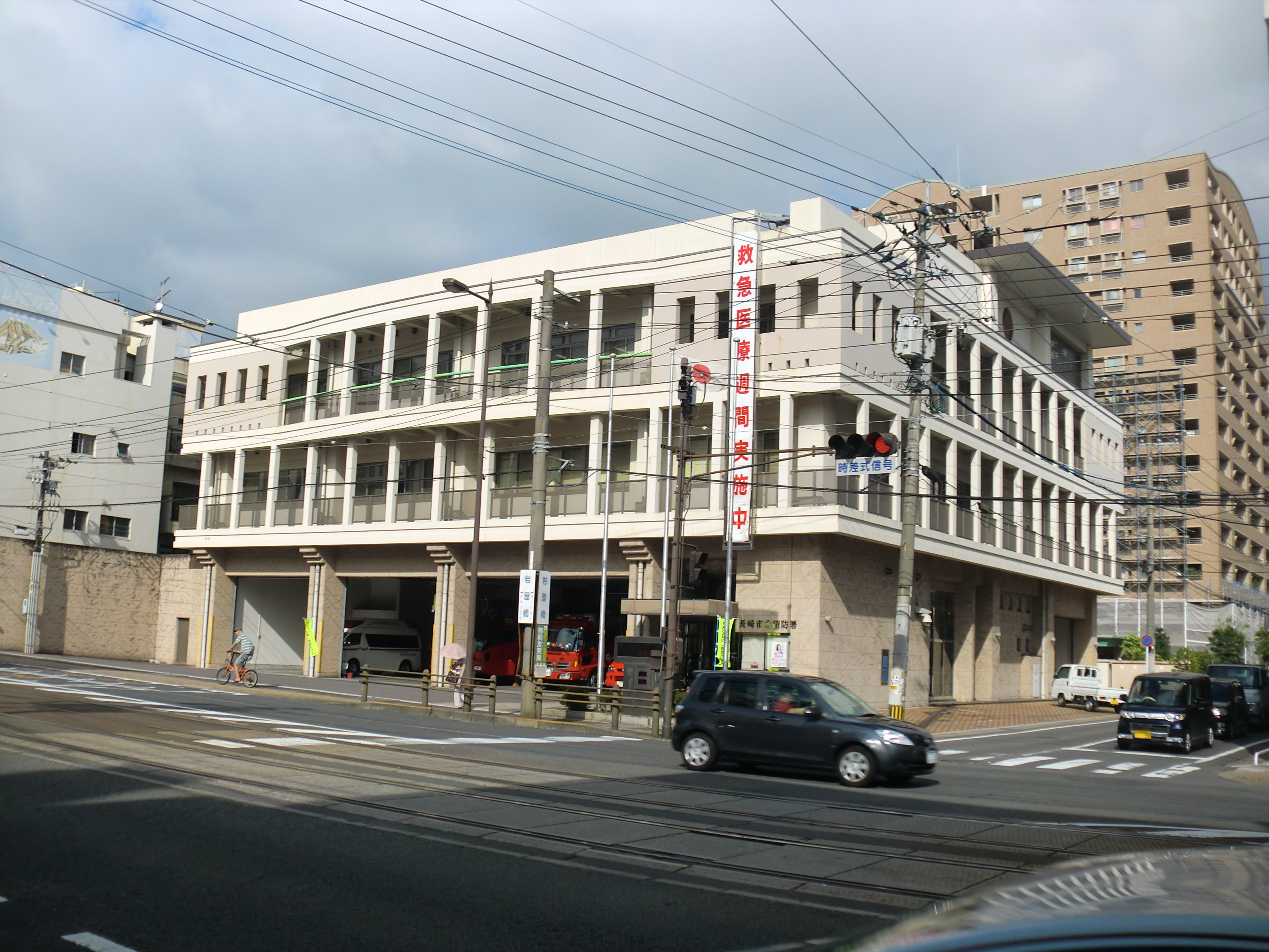 長崎県長崎市にある長崎市消防局北消防署